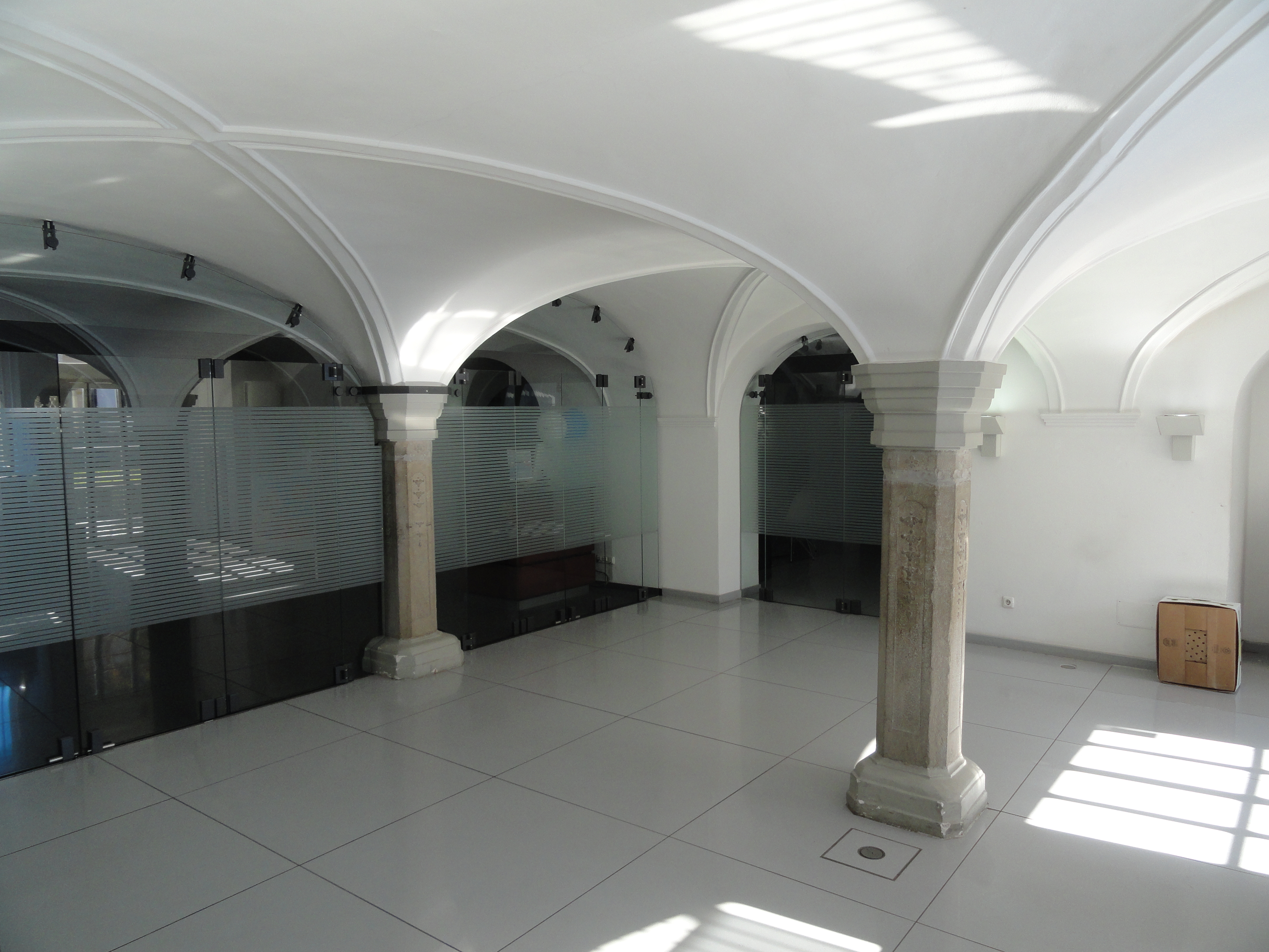 Ponikauhaus Kempten